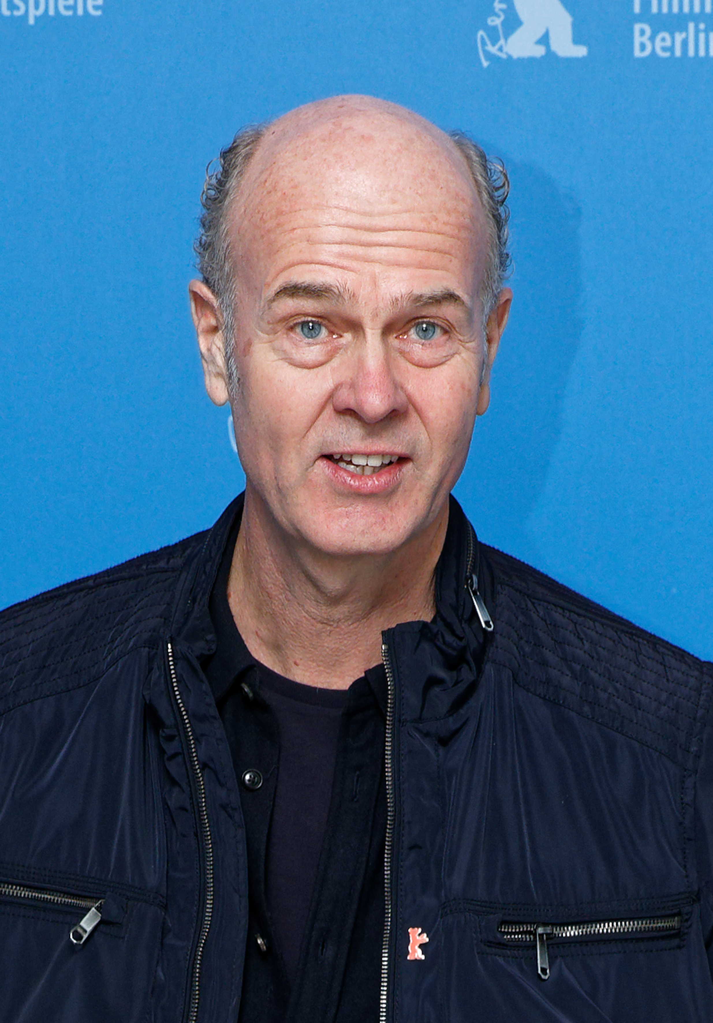 Erik Poppe beim Photo Call von Kongens Nei (The King's Choice) bei der Berlinale 2017